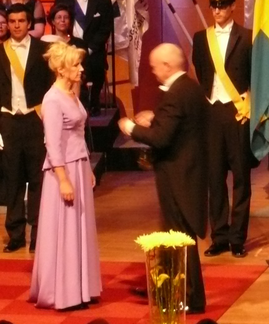 Anita Hansbo installeras som rektor vid Högskolan i Jönköping 2010